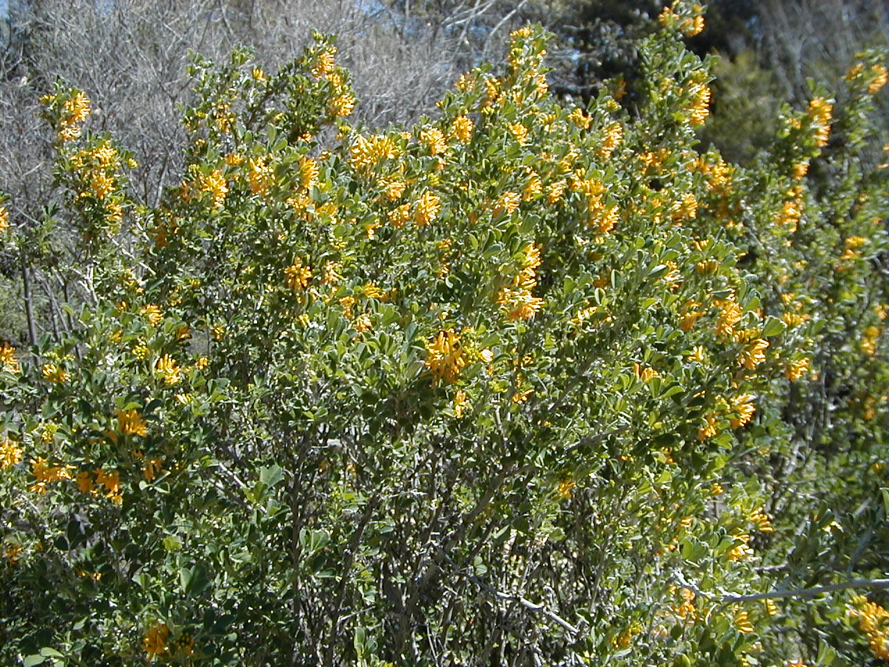 Medicago arborea. Real Jardín Botánico, Madrid.